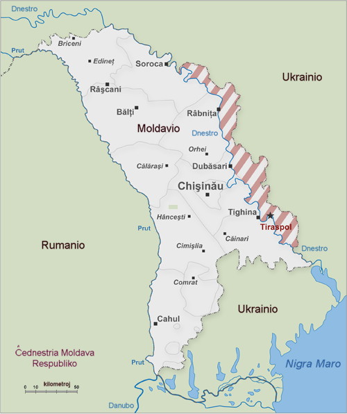 Skiza mapo de la regiono Ĉednestrio respektive la deklarita Ĉednestria Moldava Respubliko Fonto: la germana vikipedio bild:Karte Transnistrien 02 02.png Kategorio:Ĉednestrio